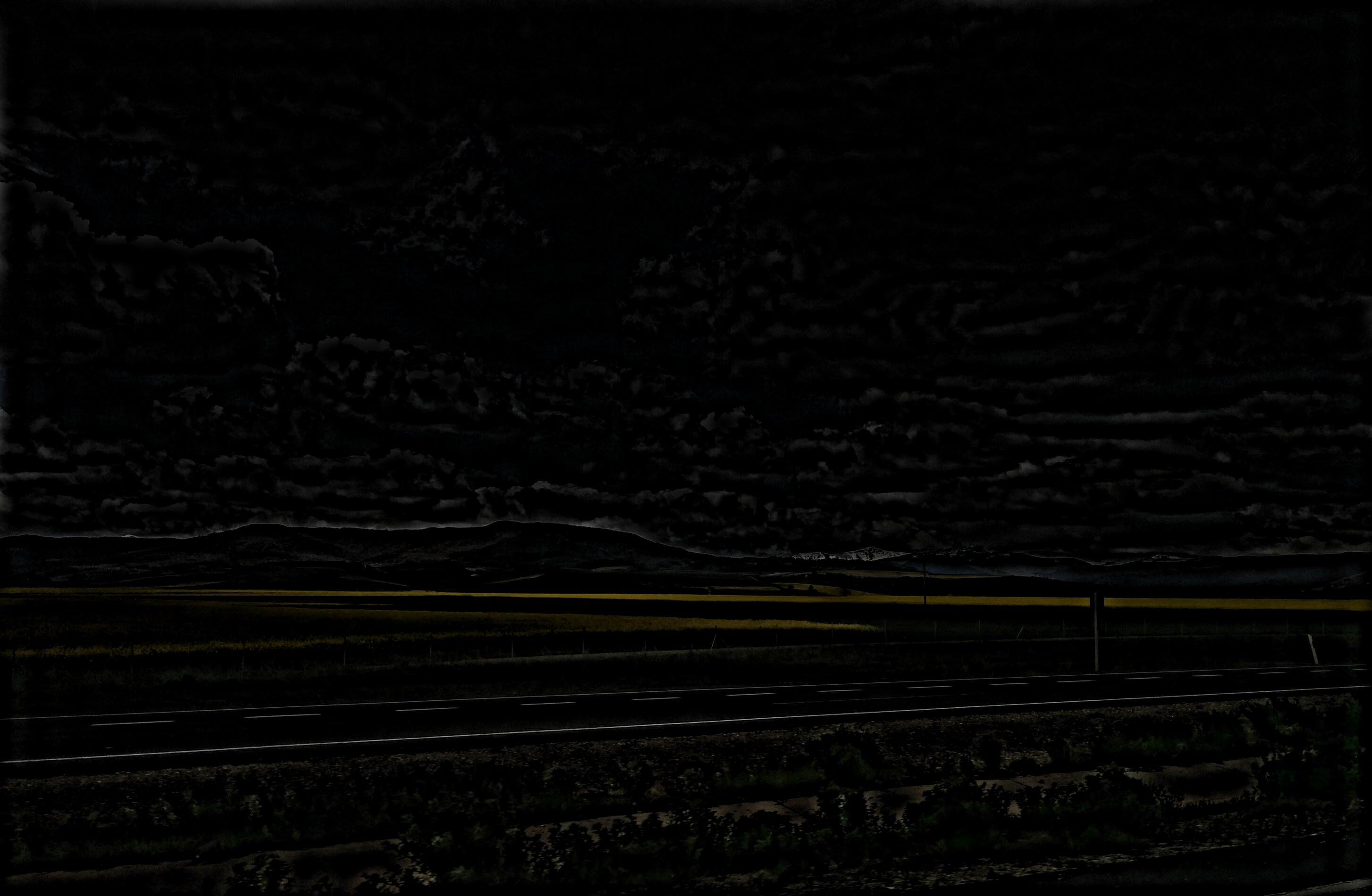 Imagen filtrada en el dominio espacial